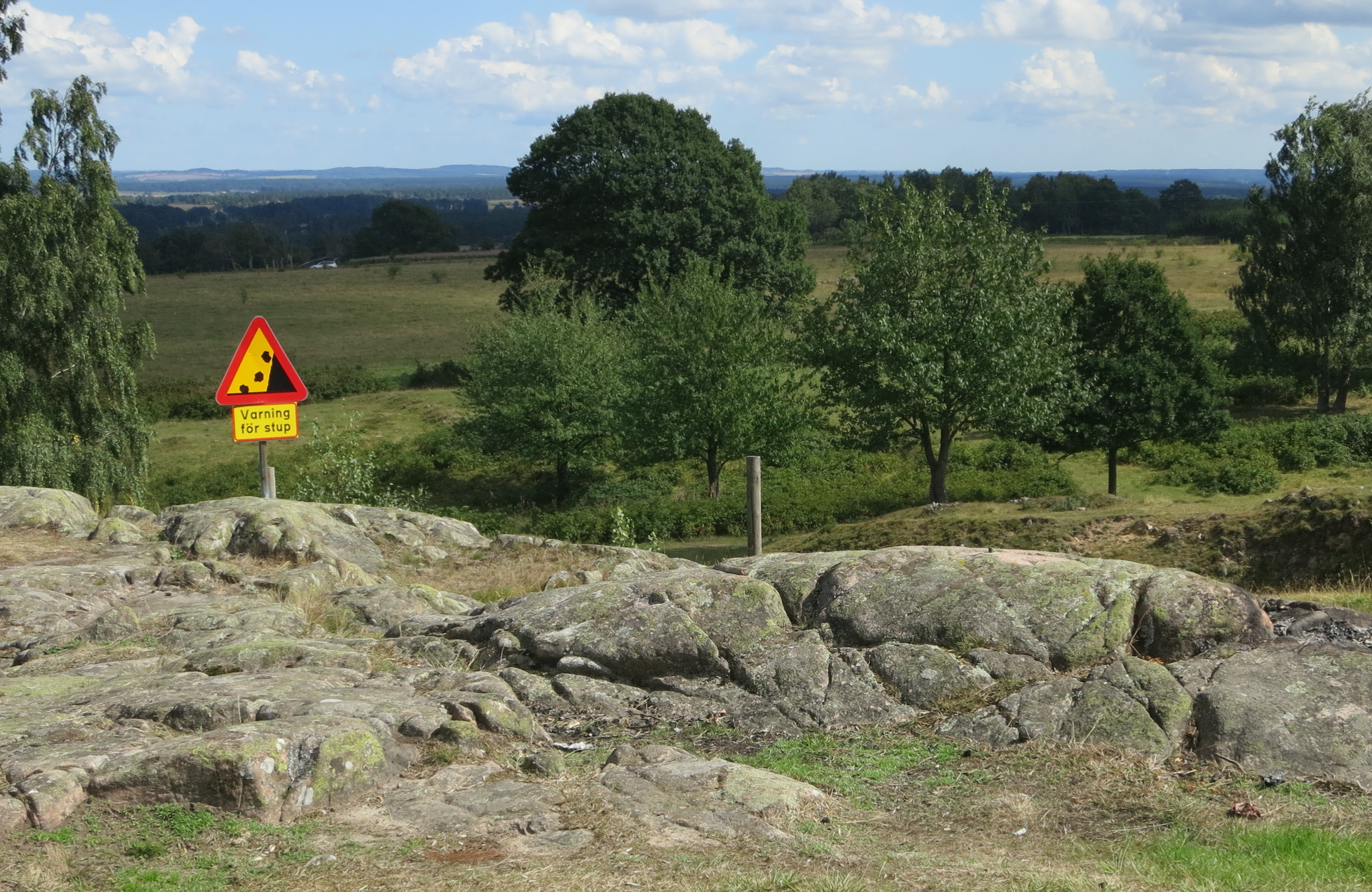 Knivsåsens naturreservat mot Vombsänkan